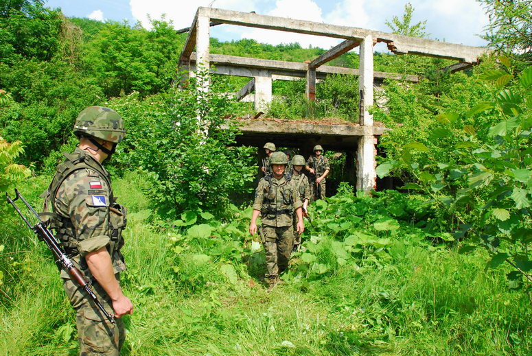 Polski Kontyngent Wojskowy w Bośni i Hercegowinie